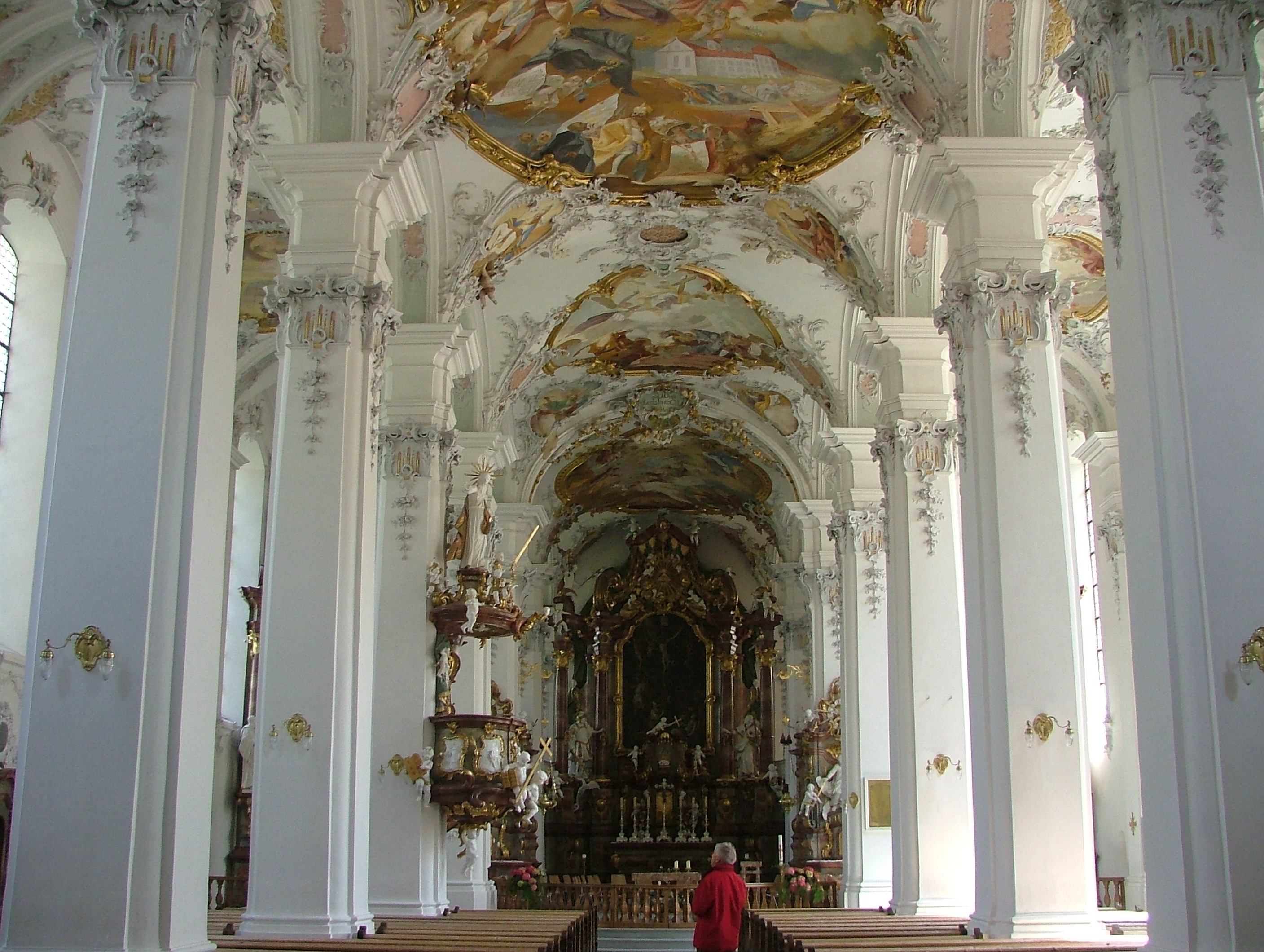 St.Georgskirche